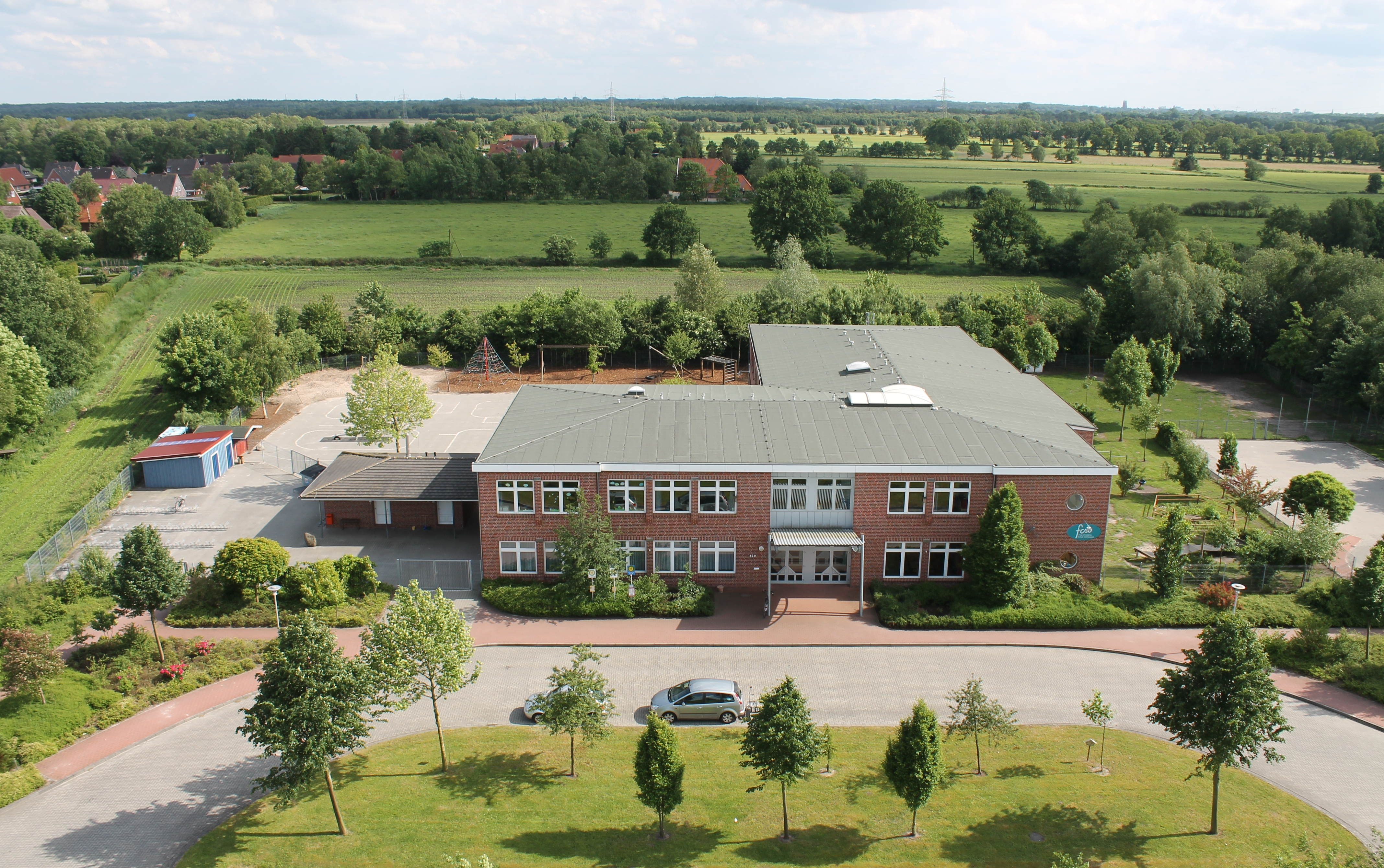 Schrägluftbild vom Primarstufengebäude der FCSO, Architekt: Georg Tjards